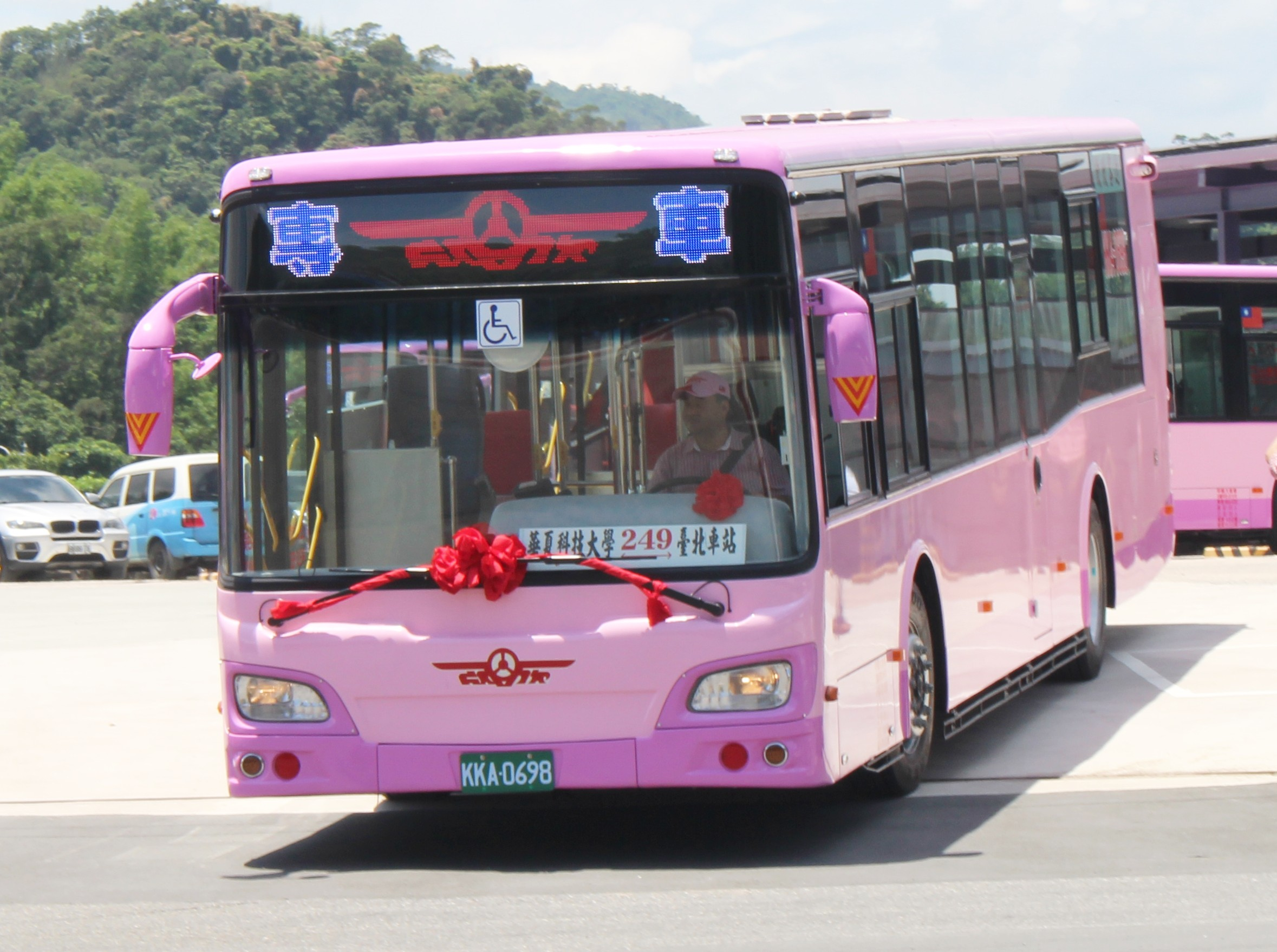 欣欣客運 2019 HINO HS8JRVL KKA-0698